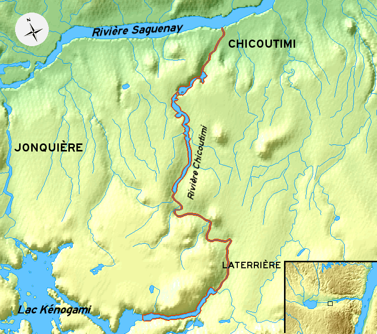 Carte topographique de la rivière Chicoutimi